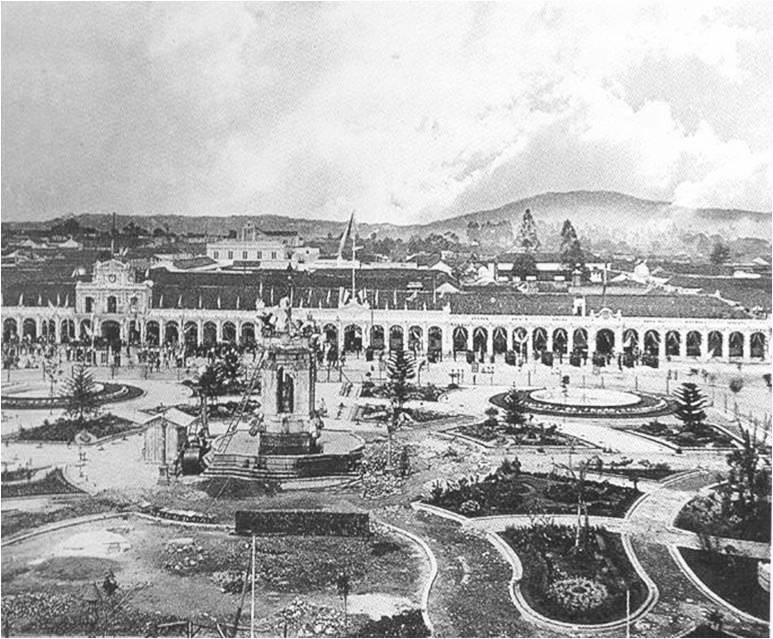 Parque Central de Guatemala en 1896.